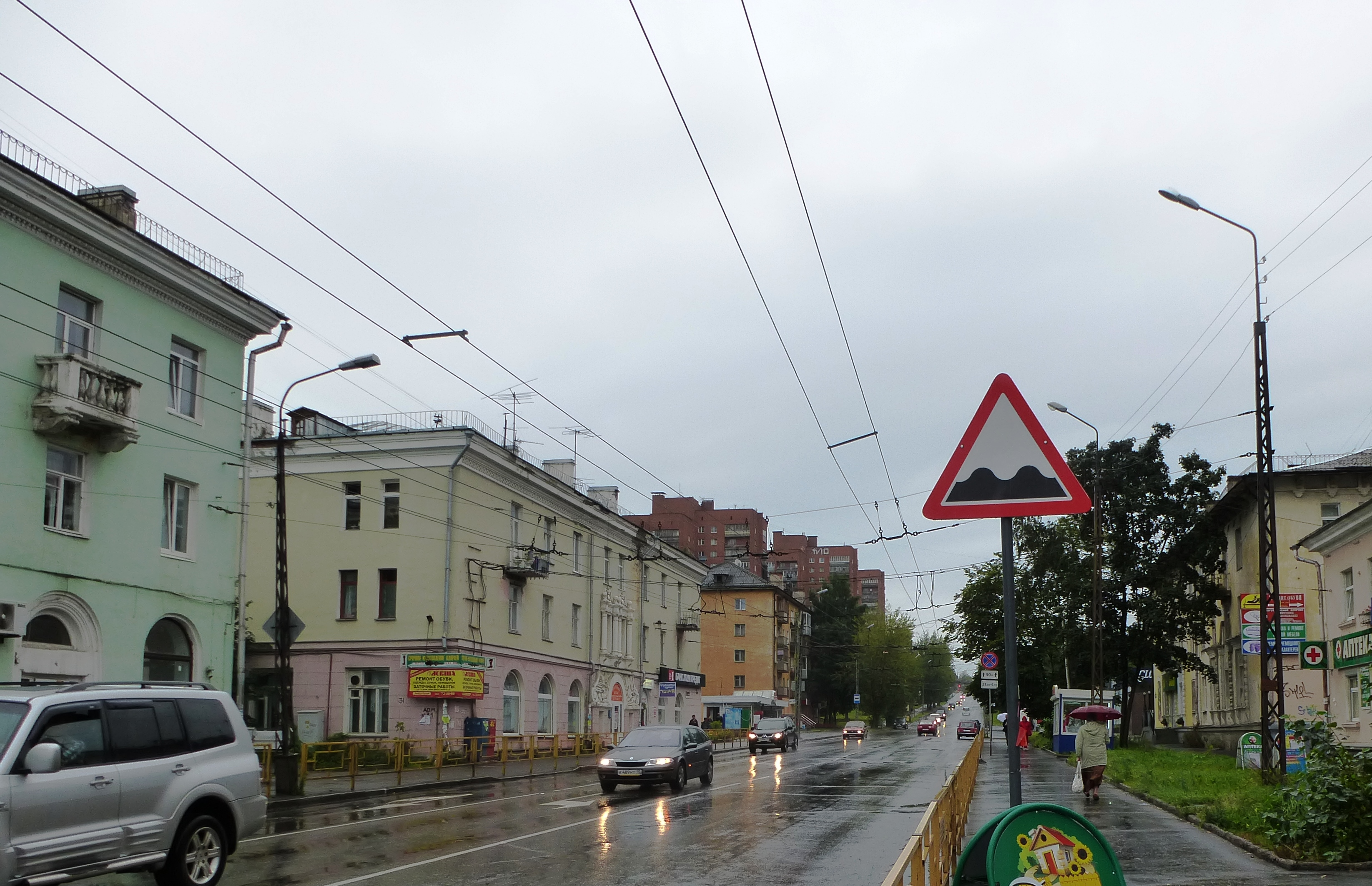 Здания на проспекте Александра Невского в Петрозаводске.